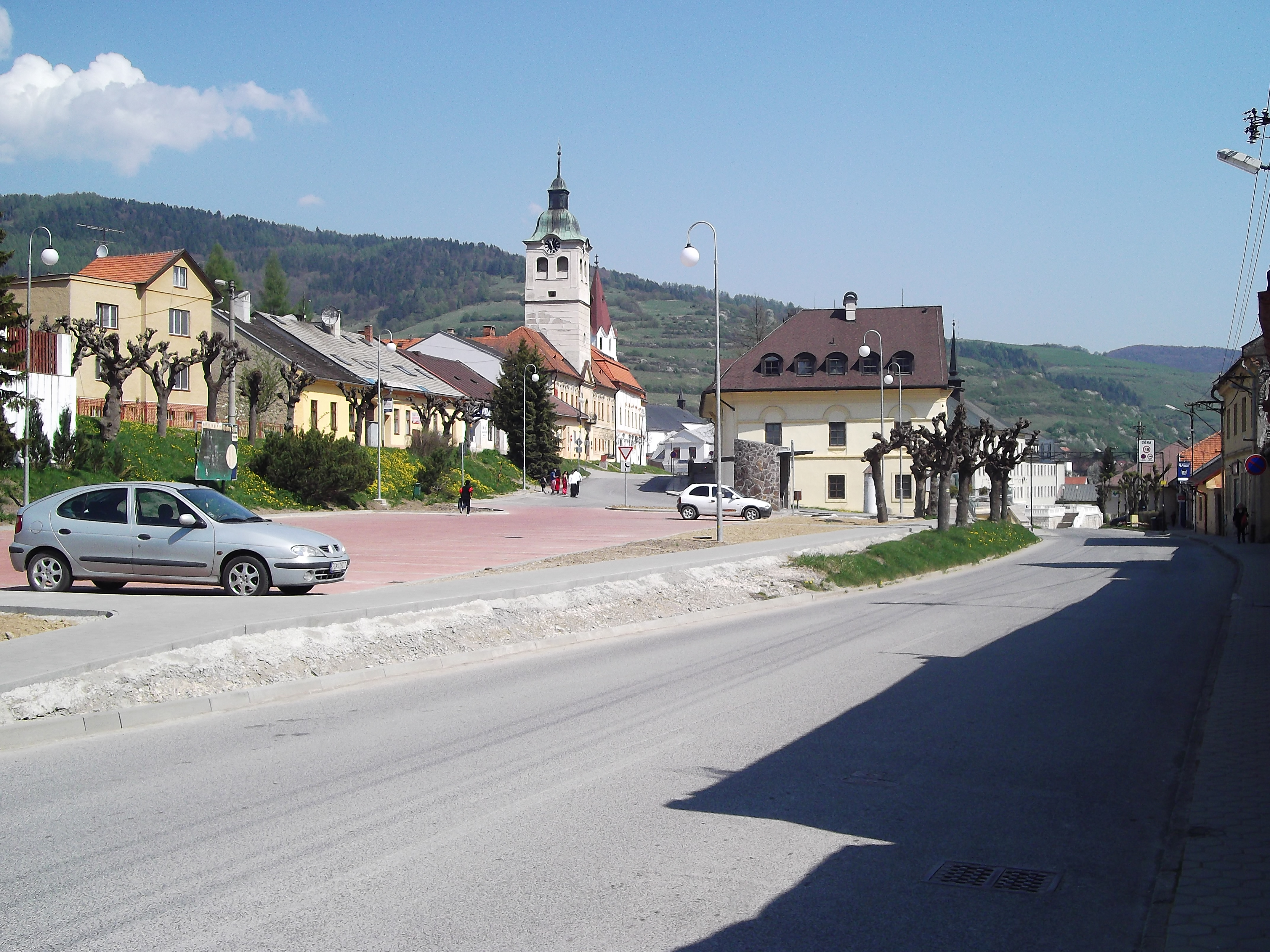 Gelnica, Blick auf den Hauptplatz (Mai 2011)